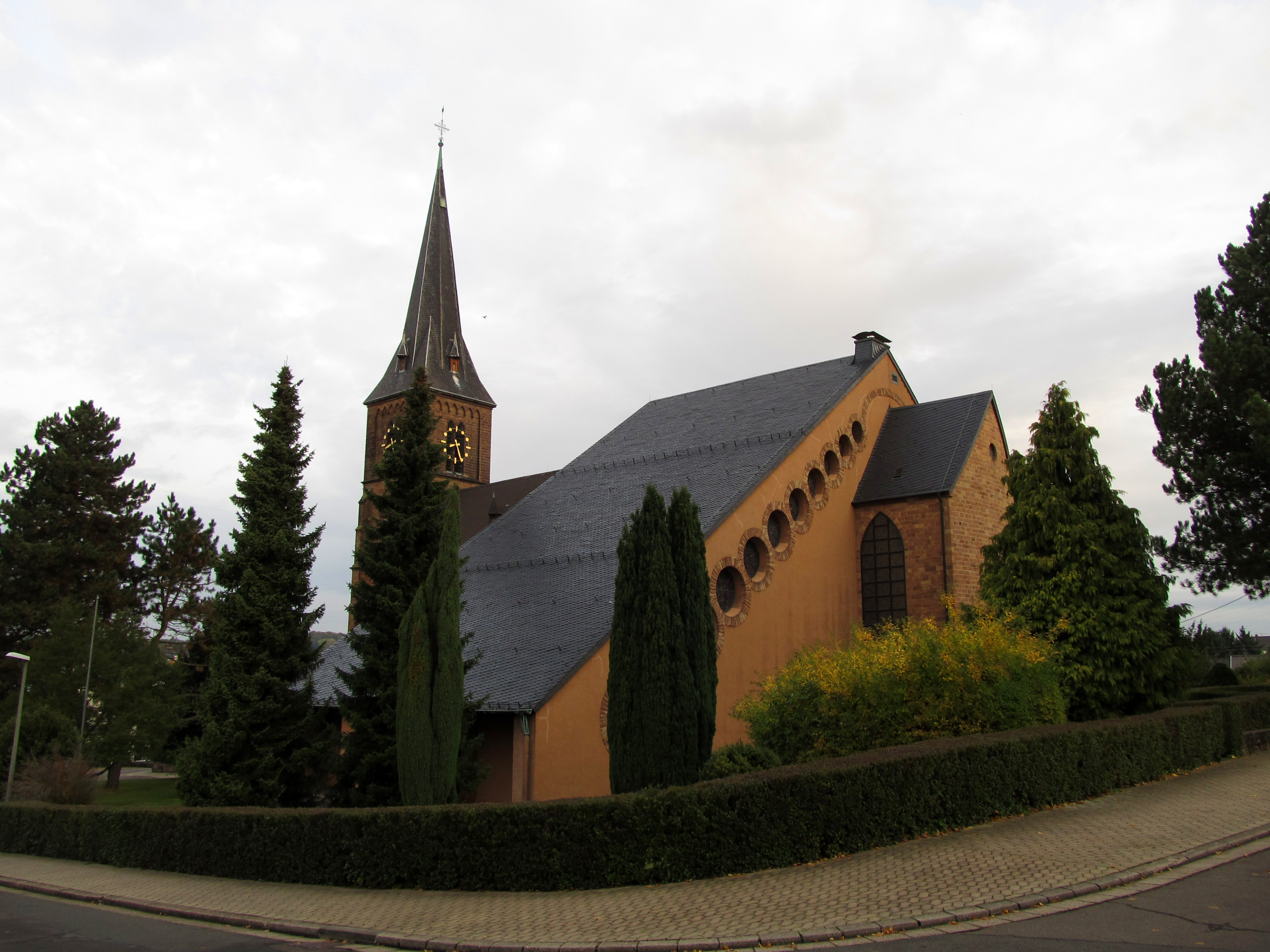 Die katholische Liebfrauenkirche in Püttlingen, Saarland